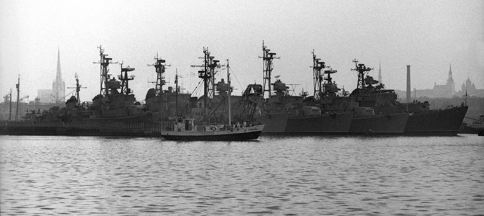 Sõjalaevad Tallinna taustal 1974: 5 Skoryy-klassi hävitajat (Statnõi, Stoiki, Surovõi, Svobodnõi, Ognennõi) ja 1 Kotlin-klassi hävitaja (Svetlõi).